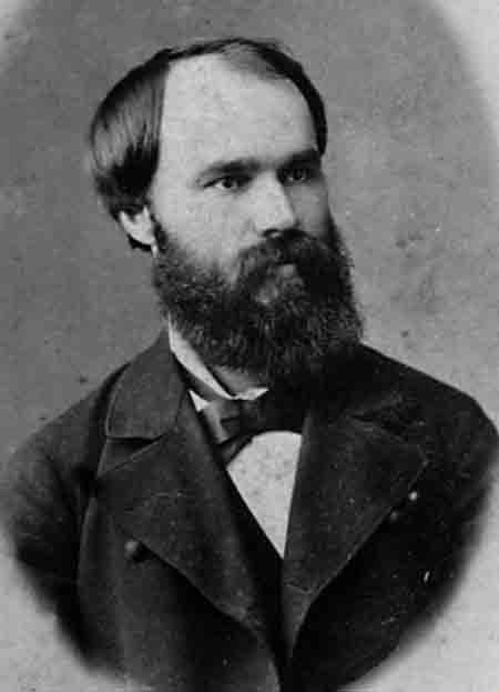 Владимир Николаевич Золотницкий (1853-1930), врач, специалист по туберкулёзу, общественный деятель